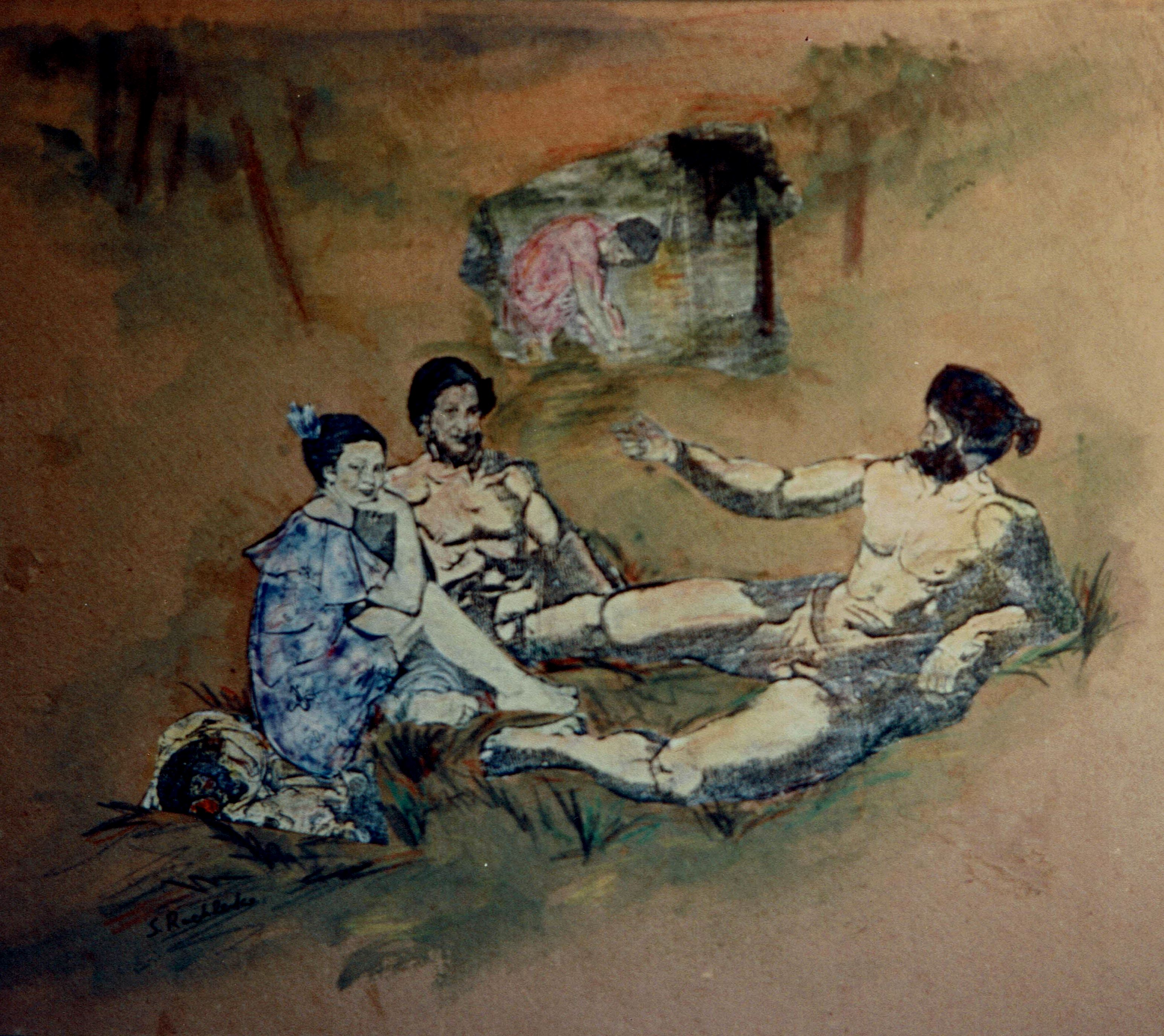 מחוות קריצה לתמונתו המפורסמת של אדואר מאנה, הוצגה במכון לתרבות צרפת ב-1992. טכניקה מעורבת של קולאז', אקוורל וקצת טושים מן הסדרה L'Art français, ça colle!